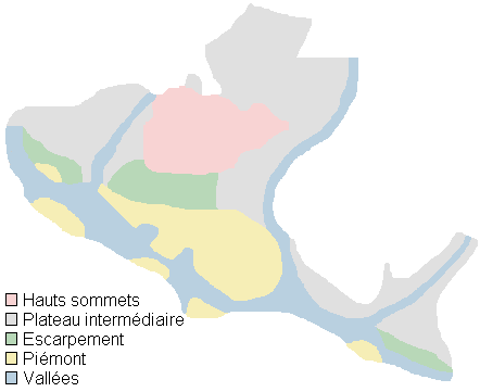 Carte du parc national des Monts-Valin montrant les unités physiographiques